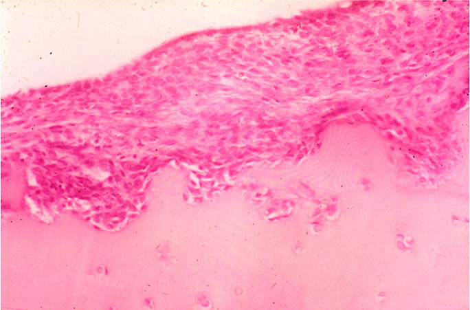 TLP-Verband